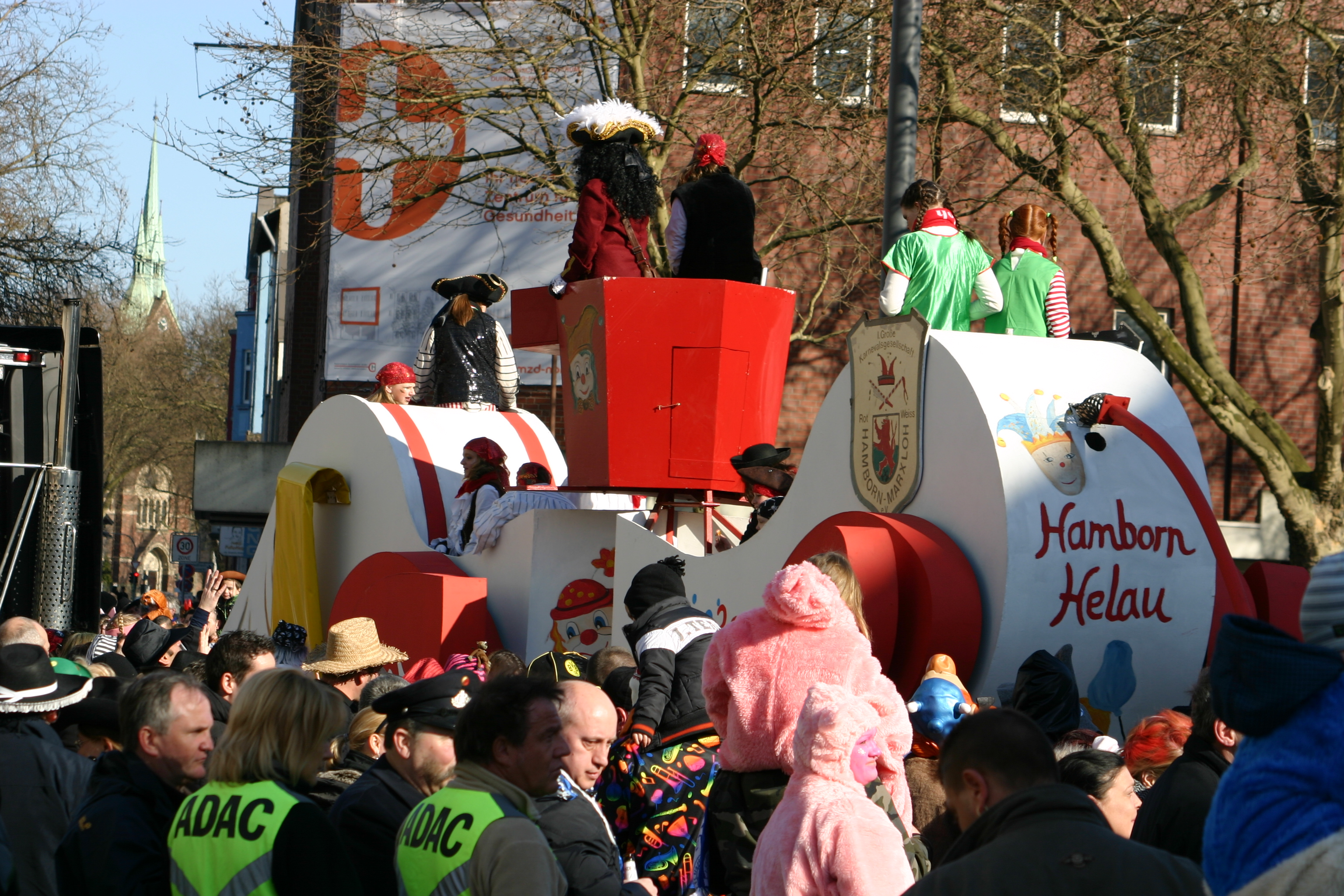 Kinderkarnevalszug in Duisburg-Hamborn. (Standort: Richterstraße / Hamborner Altmarkt.)